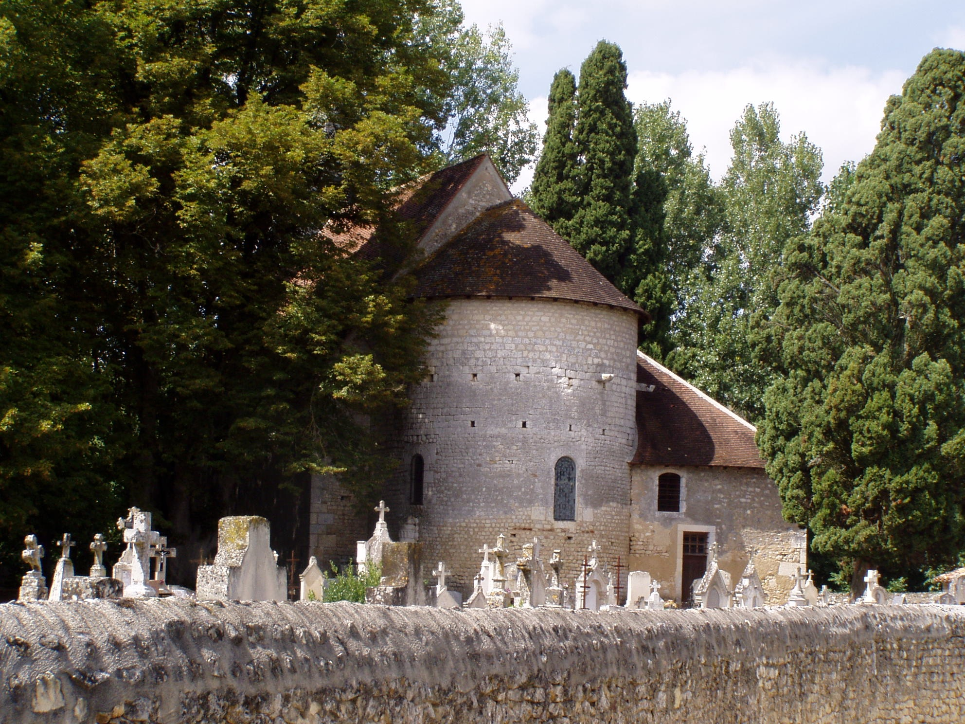 Photographie de l'église de Saint-Pierre-les-Églises près de Chauvigny dans la Vienne, prise par Accrochoc le 23 août fr:2006.